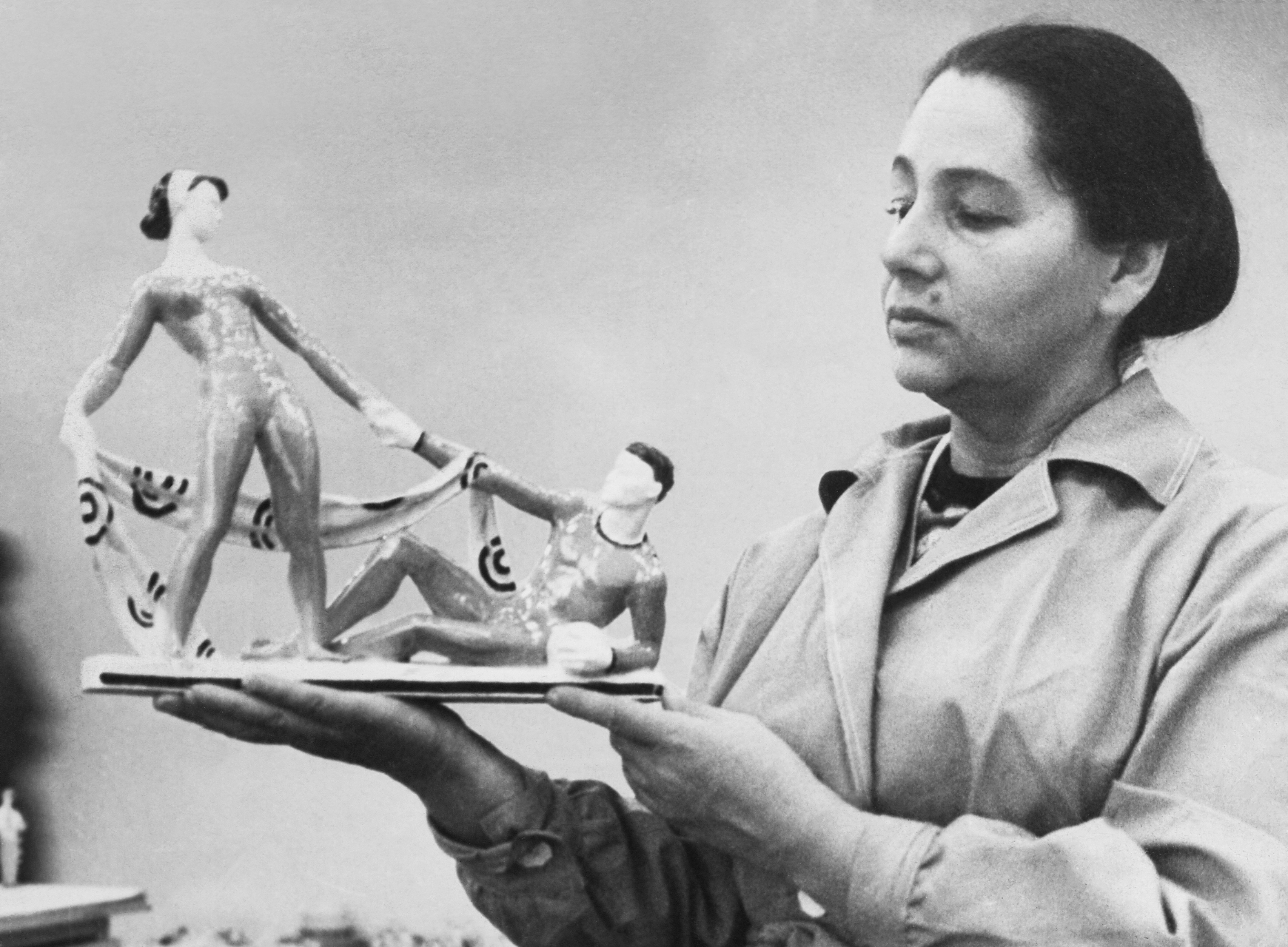 Бржезицкая Аста Давыдовна со скульптурой "Акробатический этюд (с дамой), фарфор, 1968-1969 гг. Дулёвский фарфоровый завод.